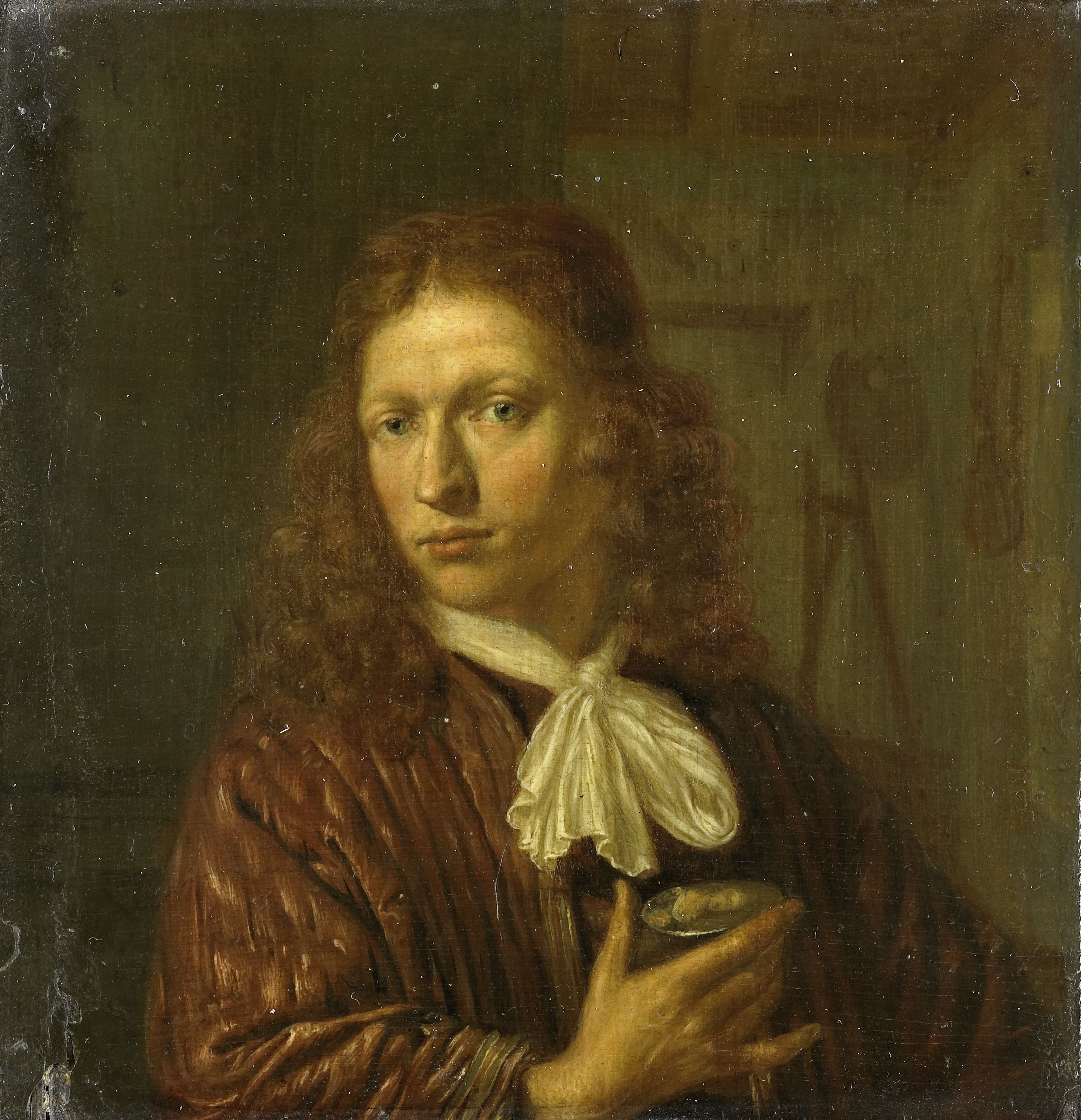 Zelfportret van de schilder Jan van Haensbergen. Buste, in de rechterhand een medaillonportretje.